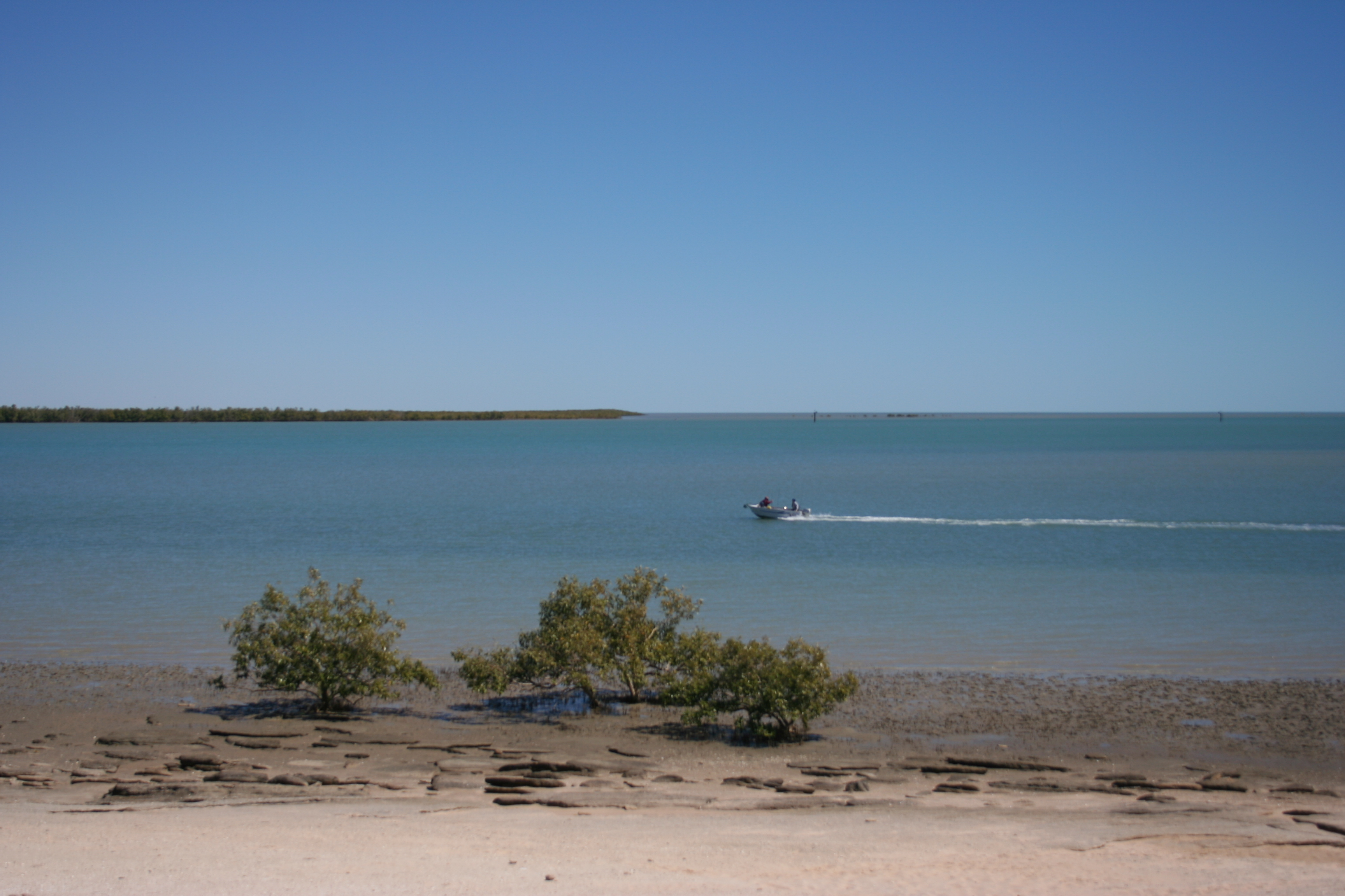 Karumba in Gulf Savannah, Queensland, Australia